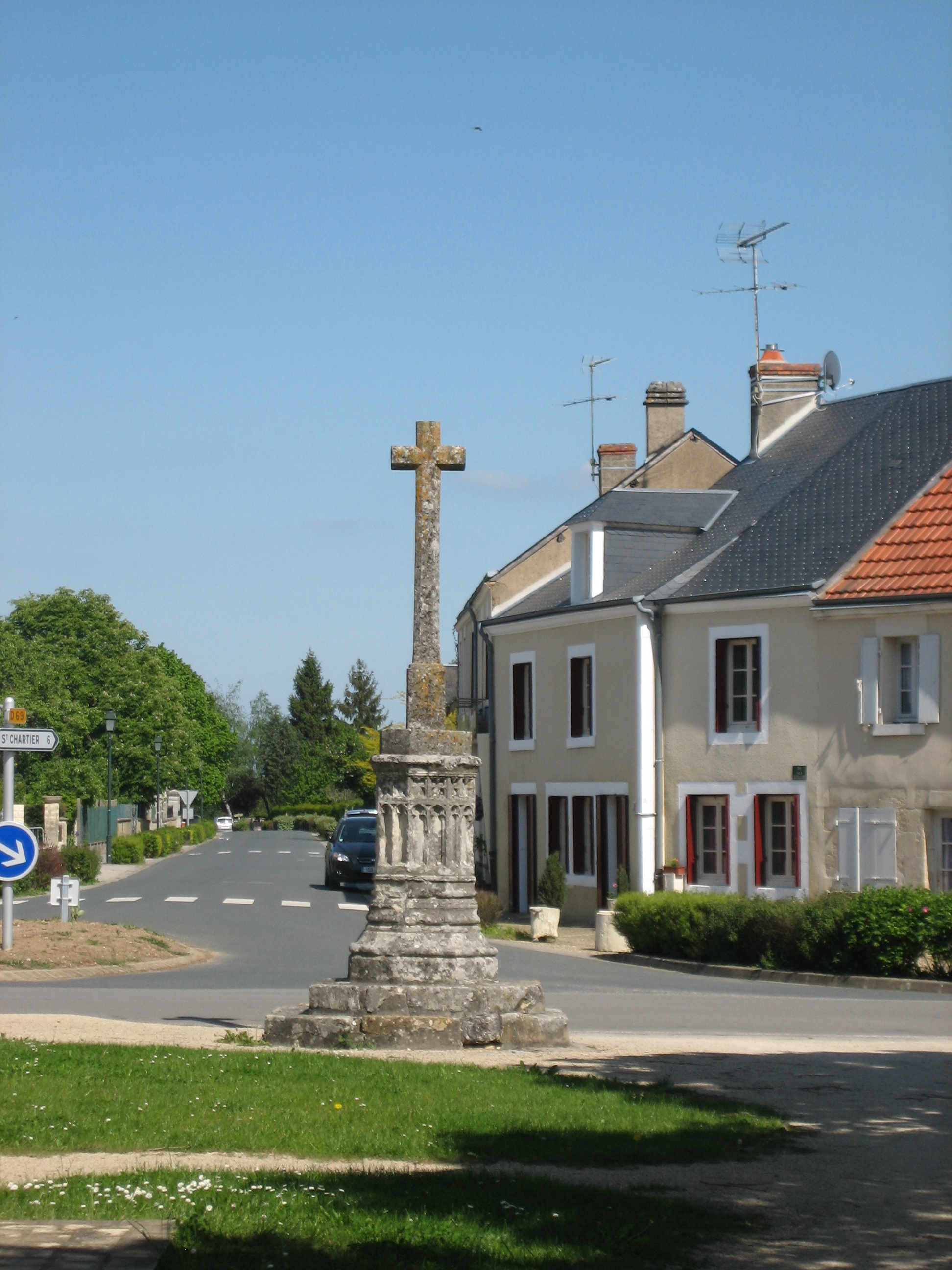 Croix monumentale, classée, devant l'église de Montipouret